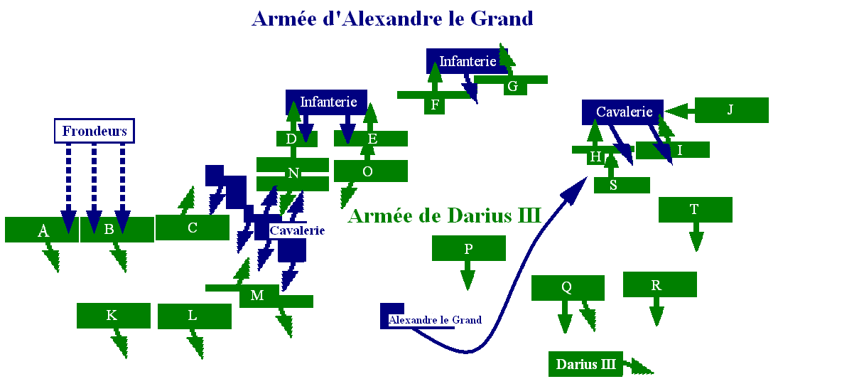 Bataille_de_Gaugamèles_7